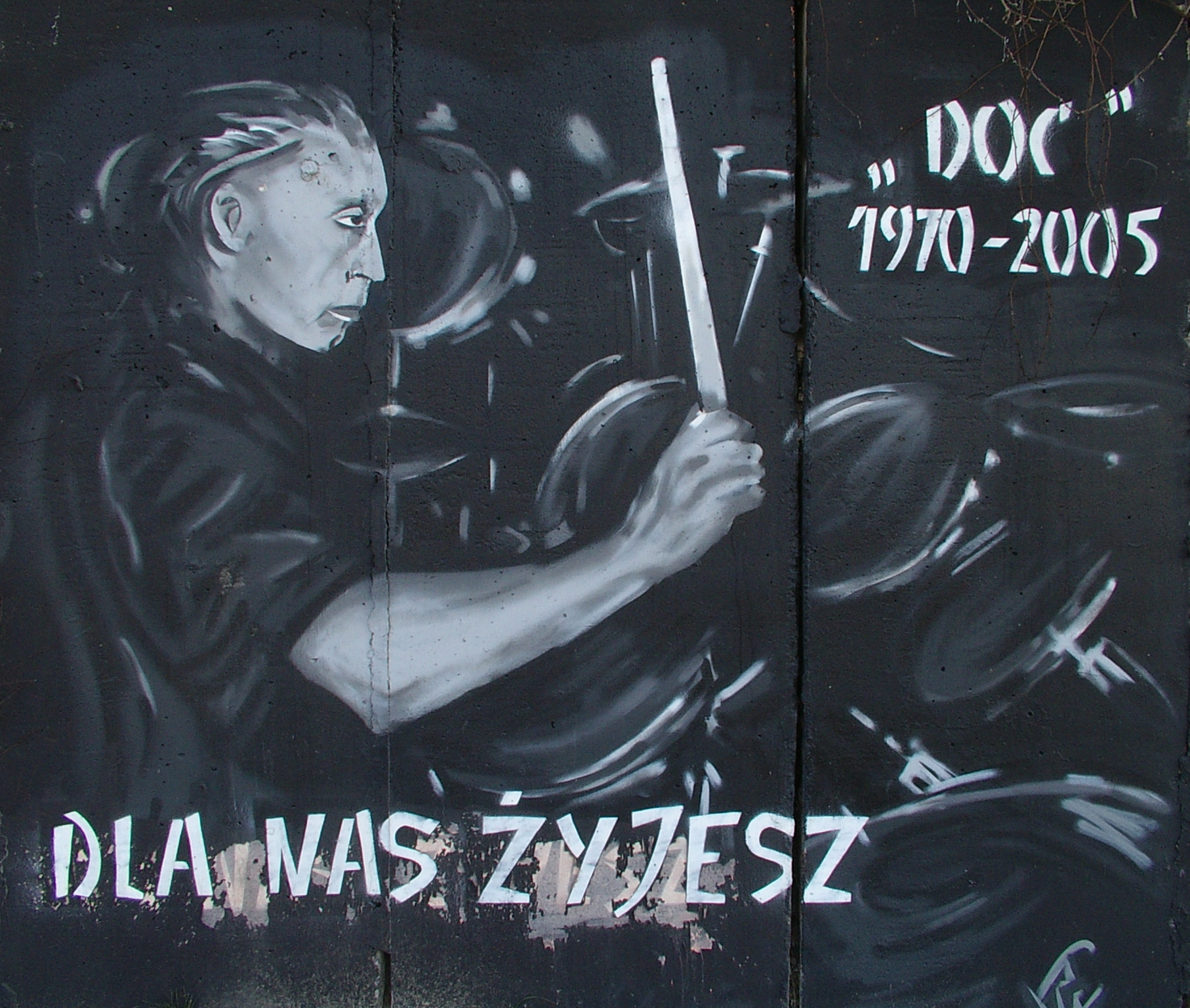 Graffiti in Olsztyn showing Krzysztof Raczkowski, polish drummer.